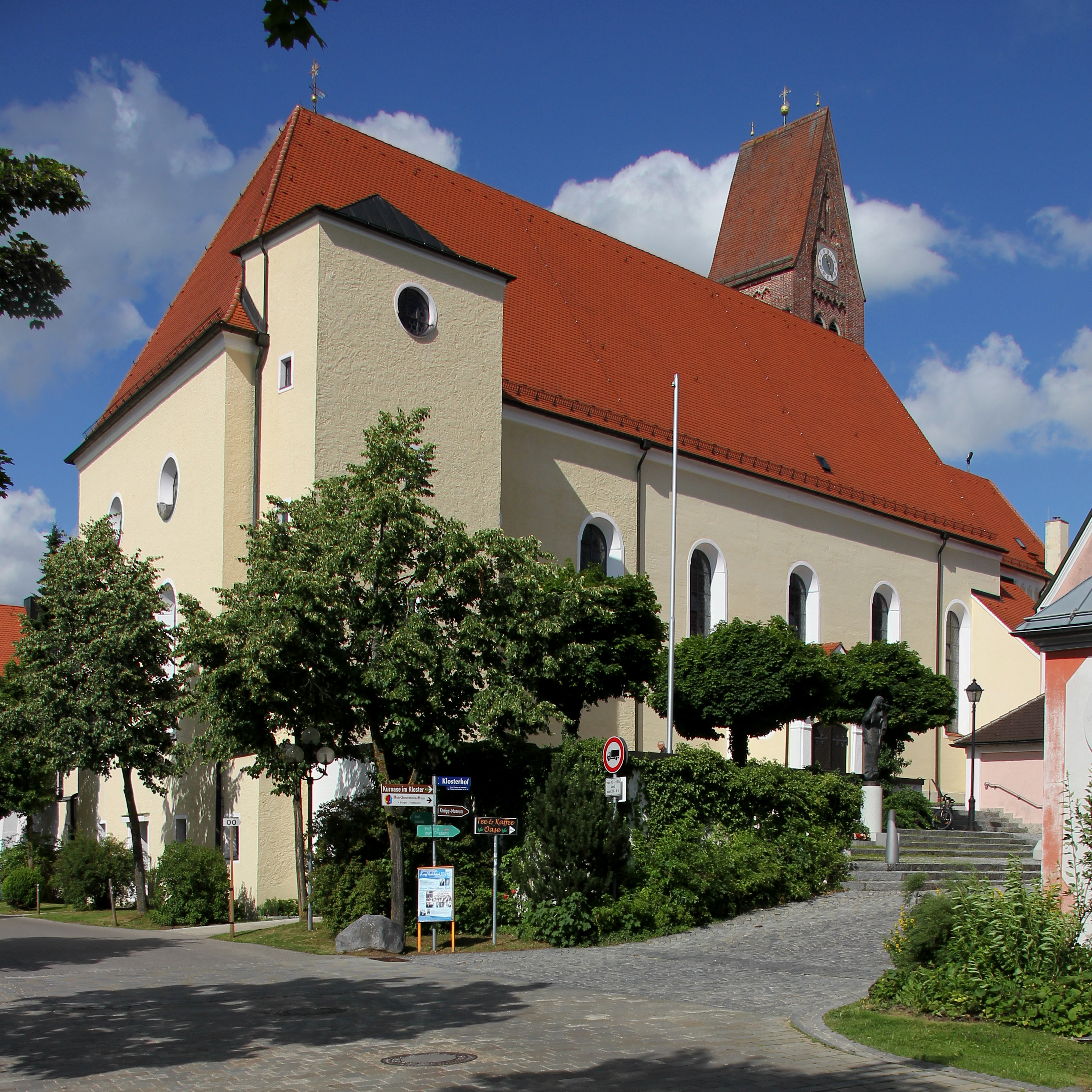 Pfarrkirche St. Justina, Bad Wörishofen, Südseite